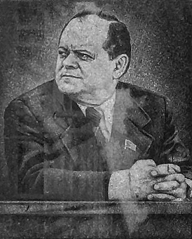 Памятная доска на доме по ул. Хохрякова, 48 в Тюмени, где жил Б. Е. Щербина.